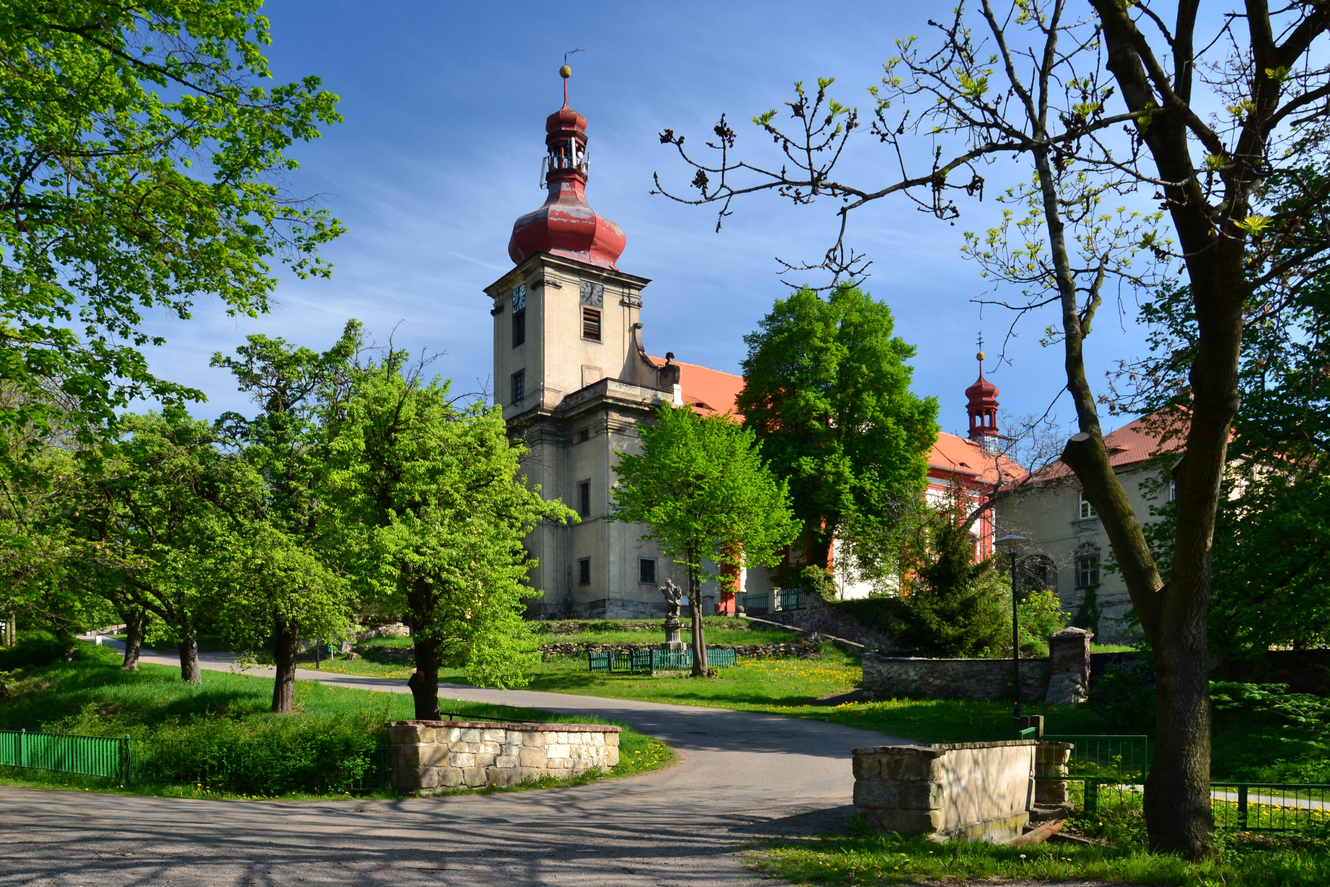 Kostel Nanebevzetí P. Marie (Horní Jiřetín), návrší ve střední části obce, Horní Jiřetín